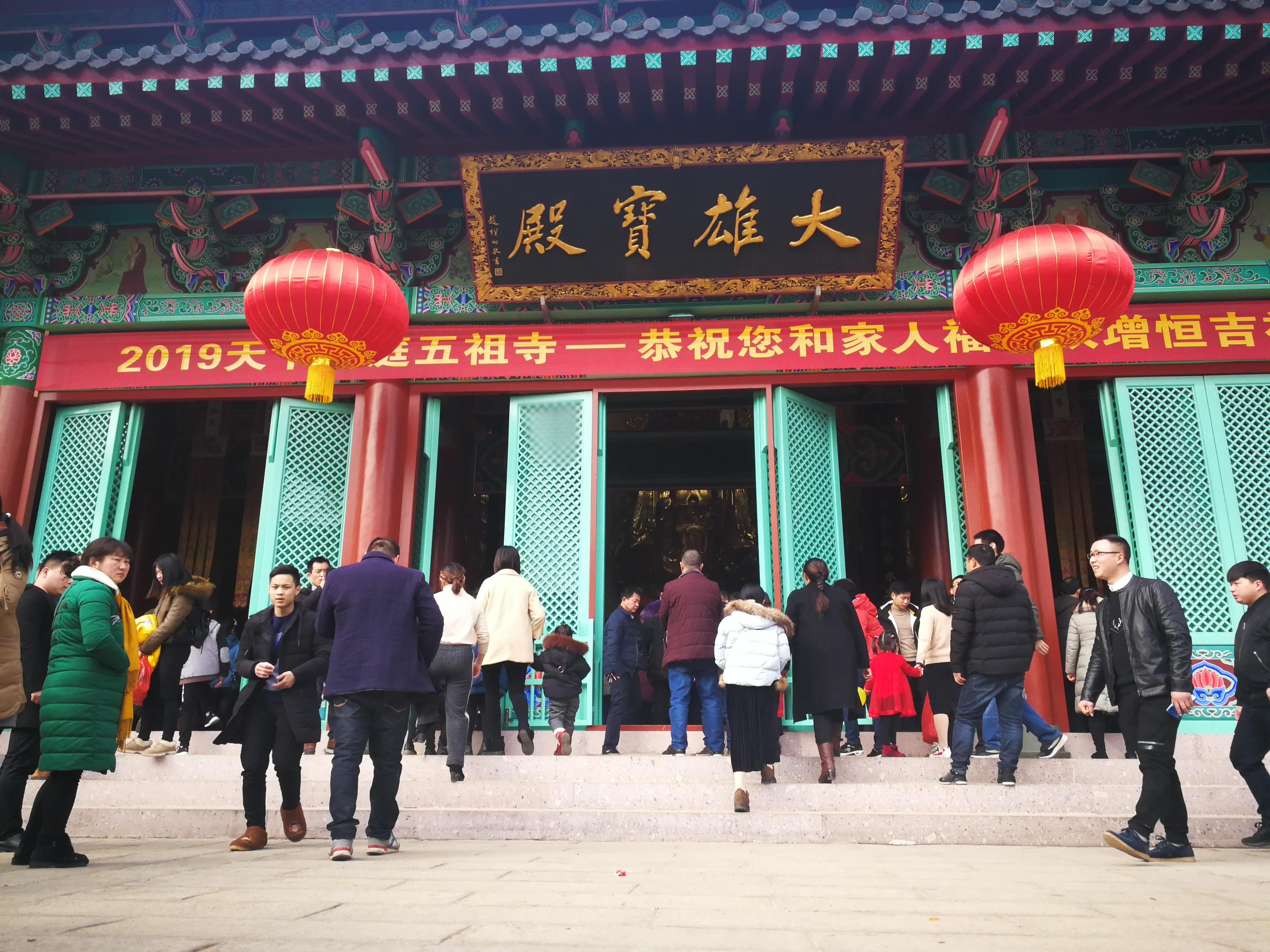 中文（中国大陆）: 五祖寺一角